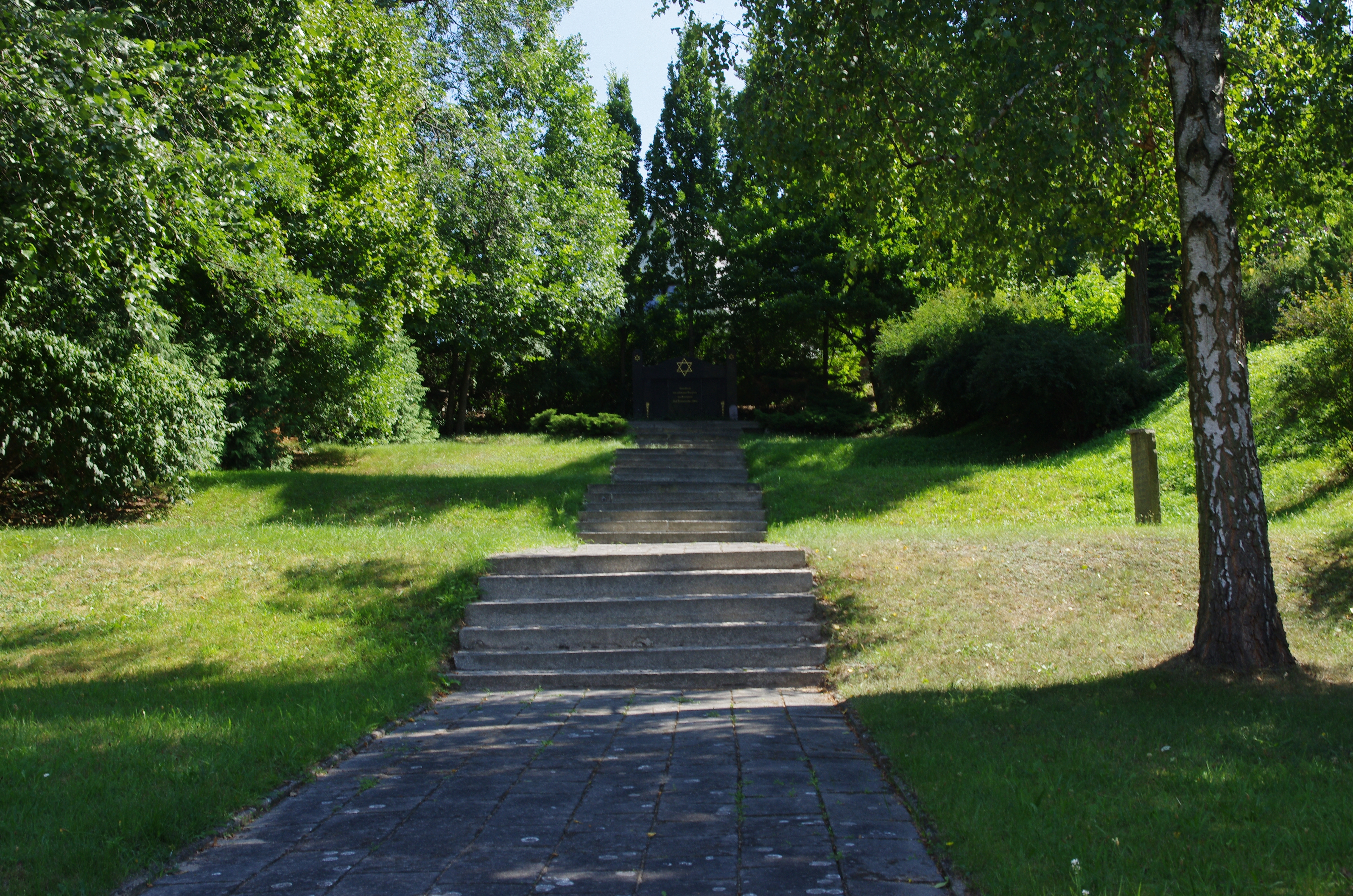 Bad Freienwalde (Oder) in Brandenburg. Der Jüdische Friedhof am Galgenberg steht unter Denkmalschutz.